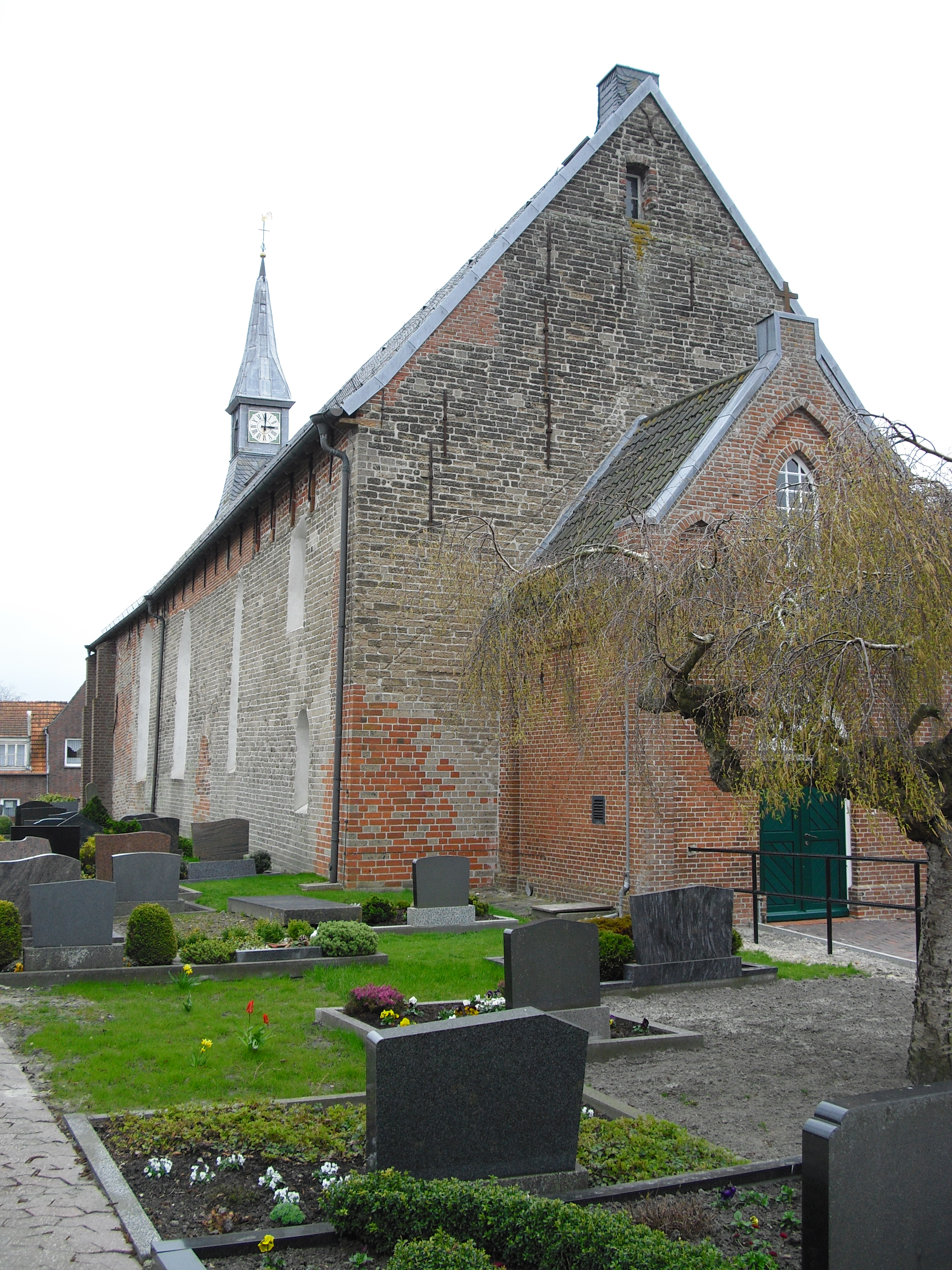 Evangelisch-lutherische Kirche in Nesse (Ortsteil von Dornum)